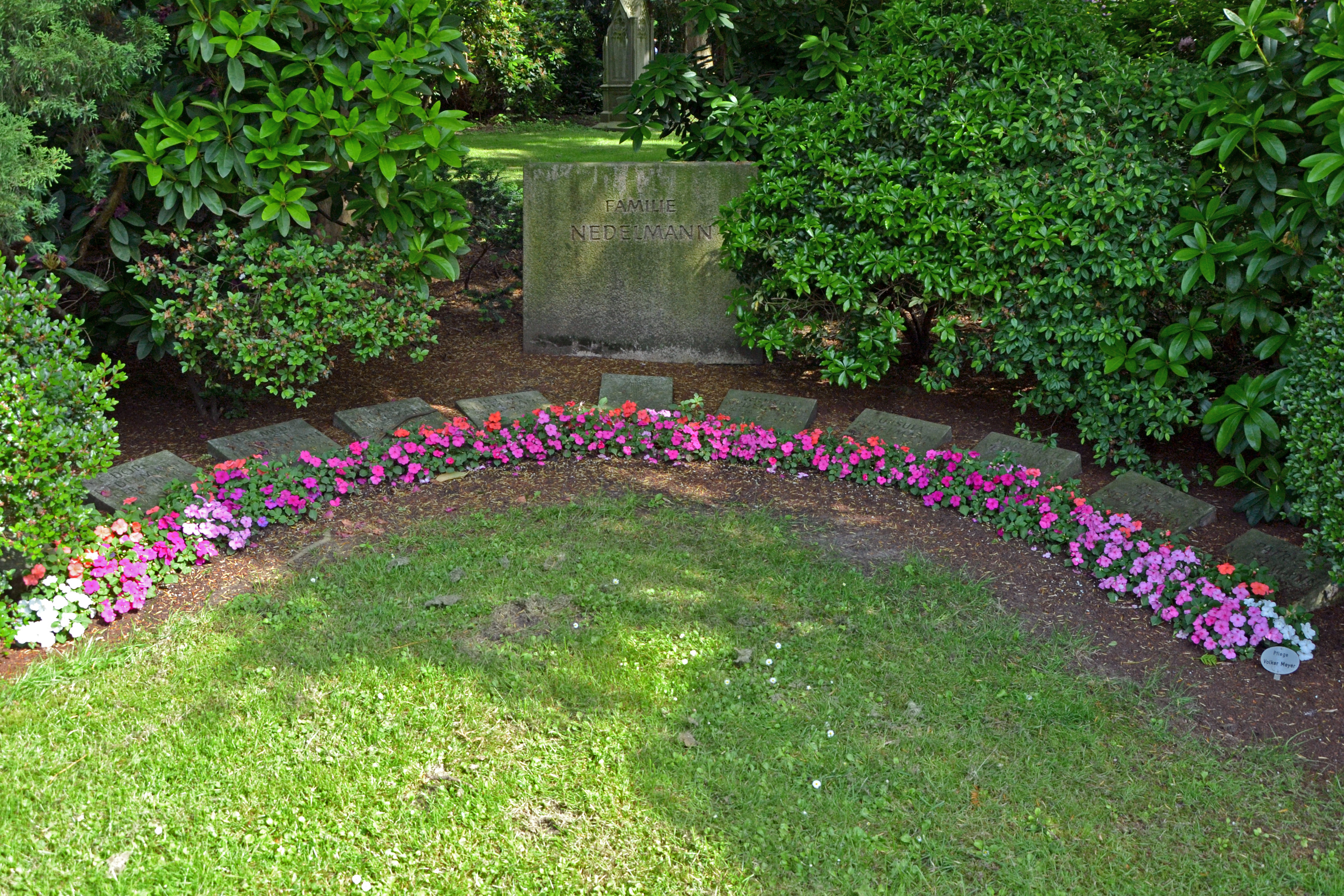 Grabmal auf dem historischen Gräberfeld des Essener Ostfriedhofs, in den 1950er Jahren vom geschlossenen Friedhof am Kettwiger überführt